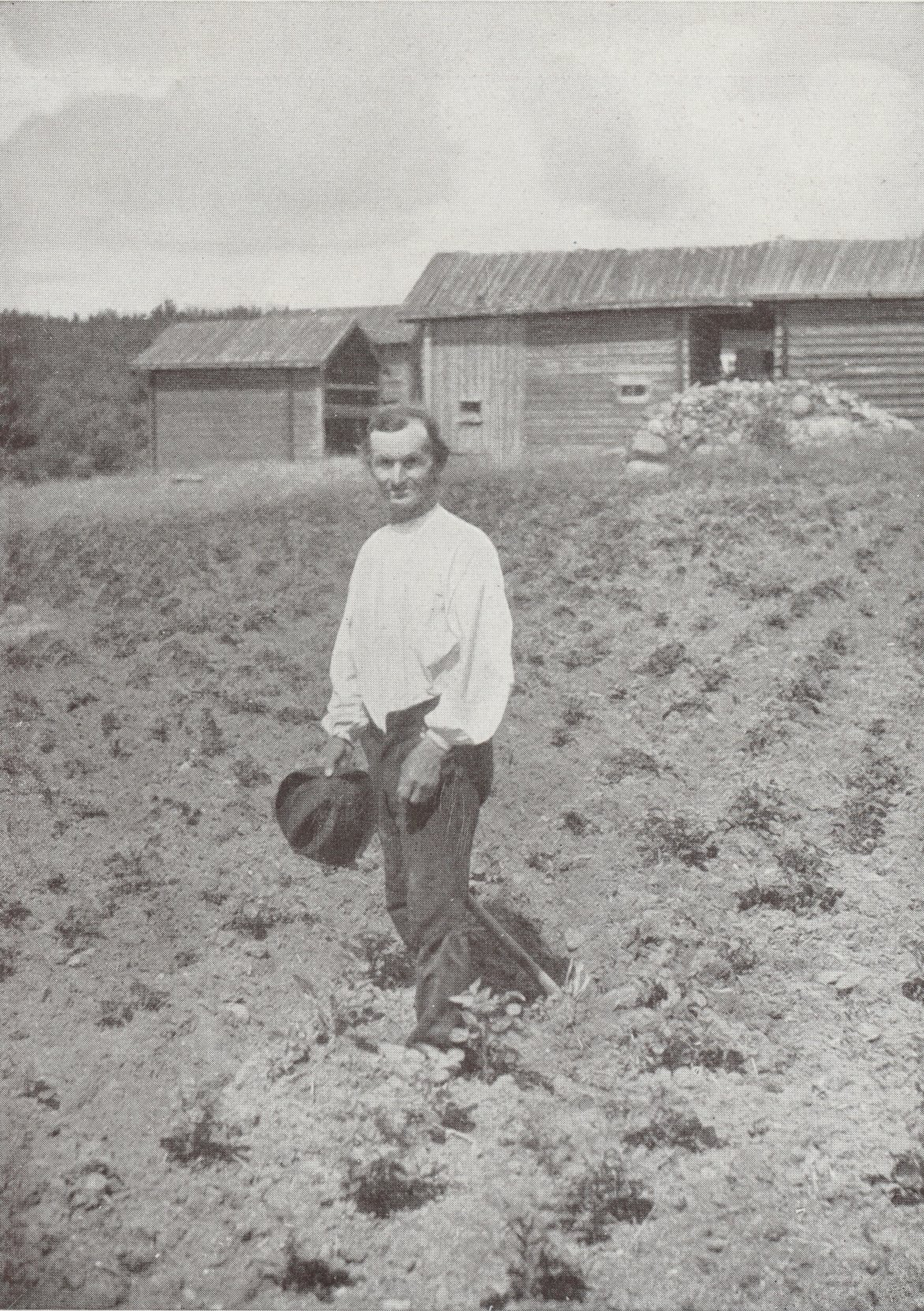 Husbonden på Juholt finngård, sannolikt Jussi Jonsson Oinonen, fotograferad i Svenska Turistföreningens årsskrift 1928.